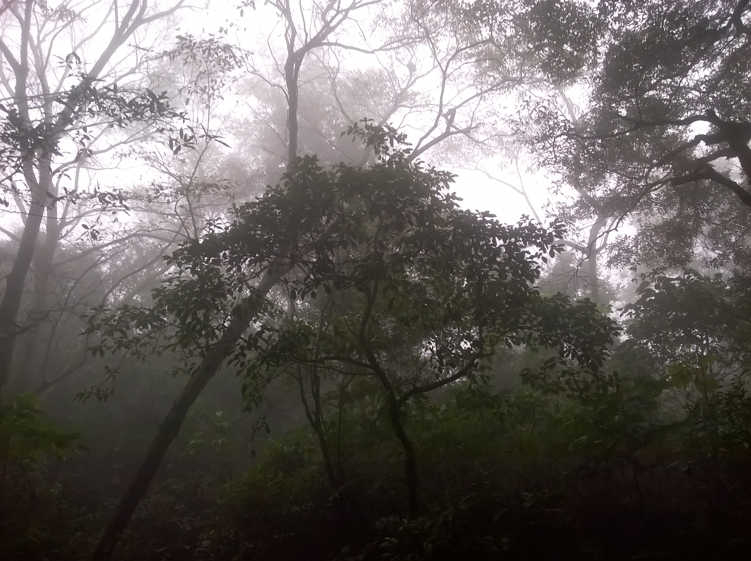 Vegetación Cerro de Escamela, Veracruz